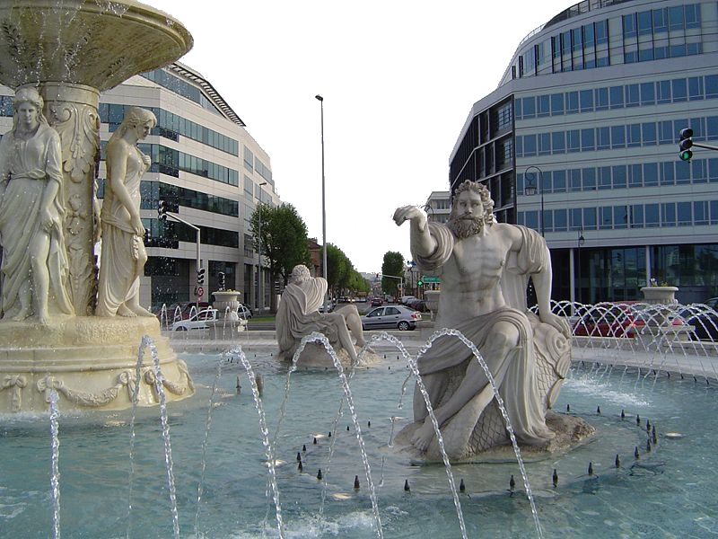 Croix de Berny à Antony